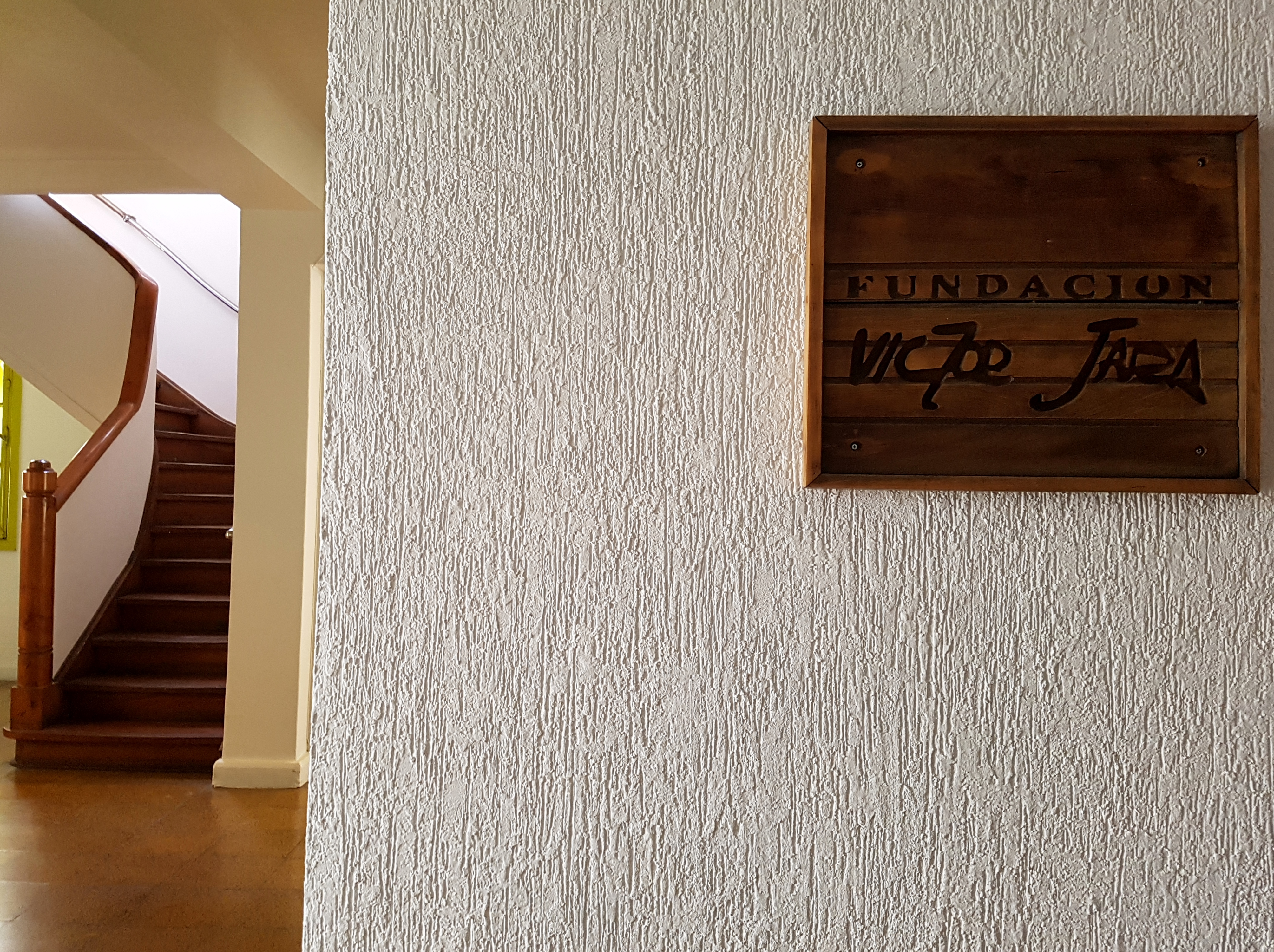 Sede de la Fundación Víctor Jara, calle Almirante Riveros 067, entre las avenidas Bustamante y Vicuña Mackenna; comuna de Providencia, Santiago de Chile.